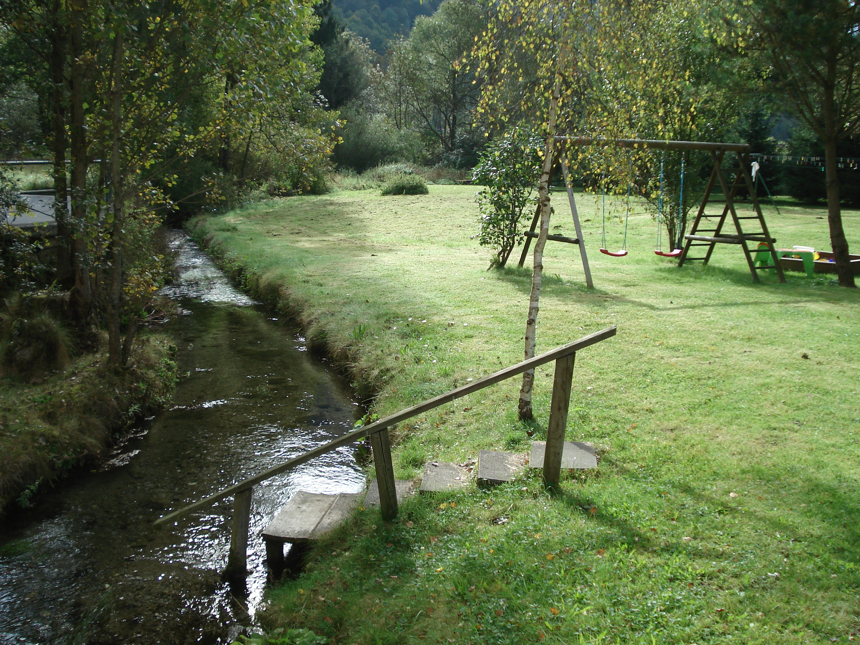 Abfließender Bach aus der Talmühlequelle bei Beuron